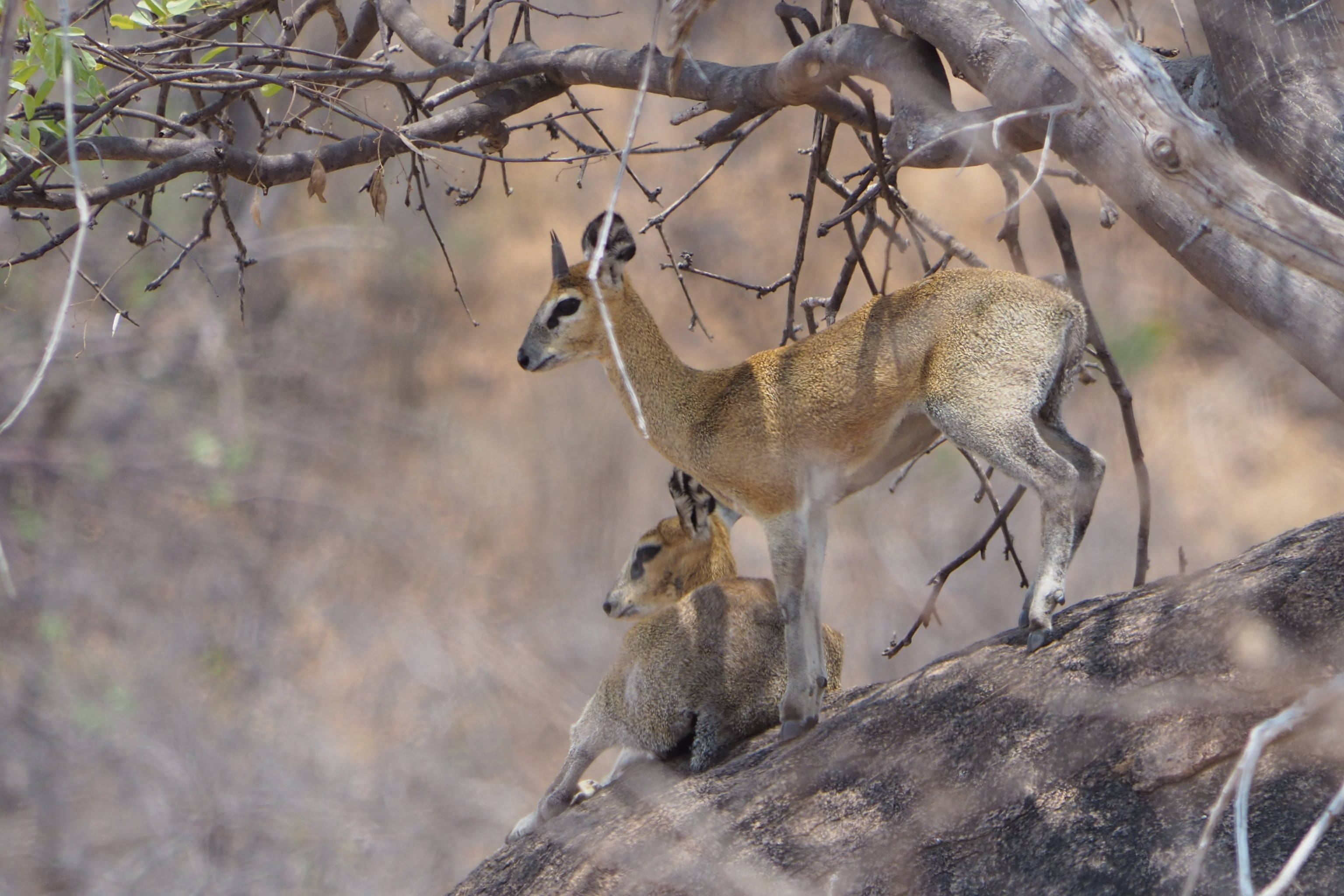 Massai-Klippspringer (Oreotragus schillingsi) im Ruaha National Park